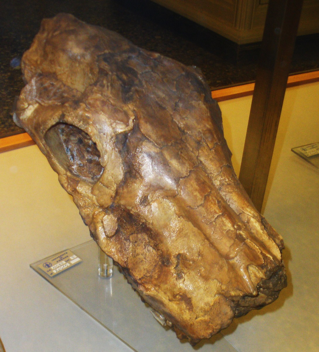 Fossil of Equus, an extinct mammal - Took the picture at Museo di Paleontologia di Firenze